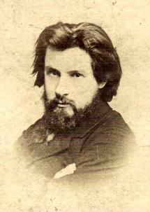 Zdjęcie portretowe Parysa Filippiego z ok. 1870 r.